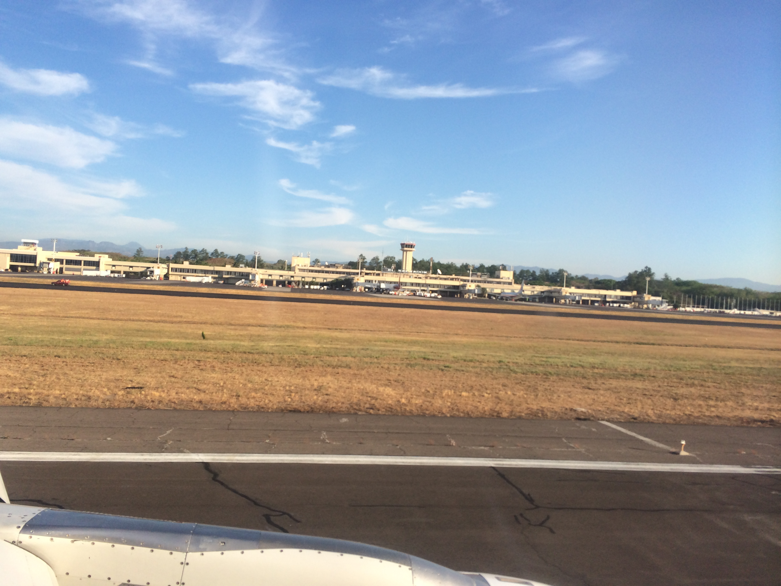 Vista del Aeropuerto Internacional de El Salvador.